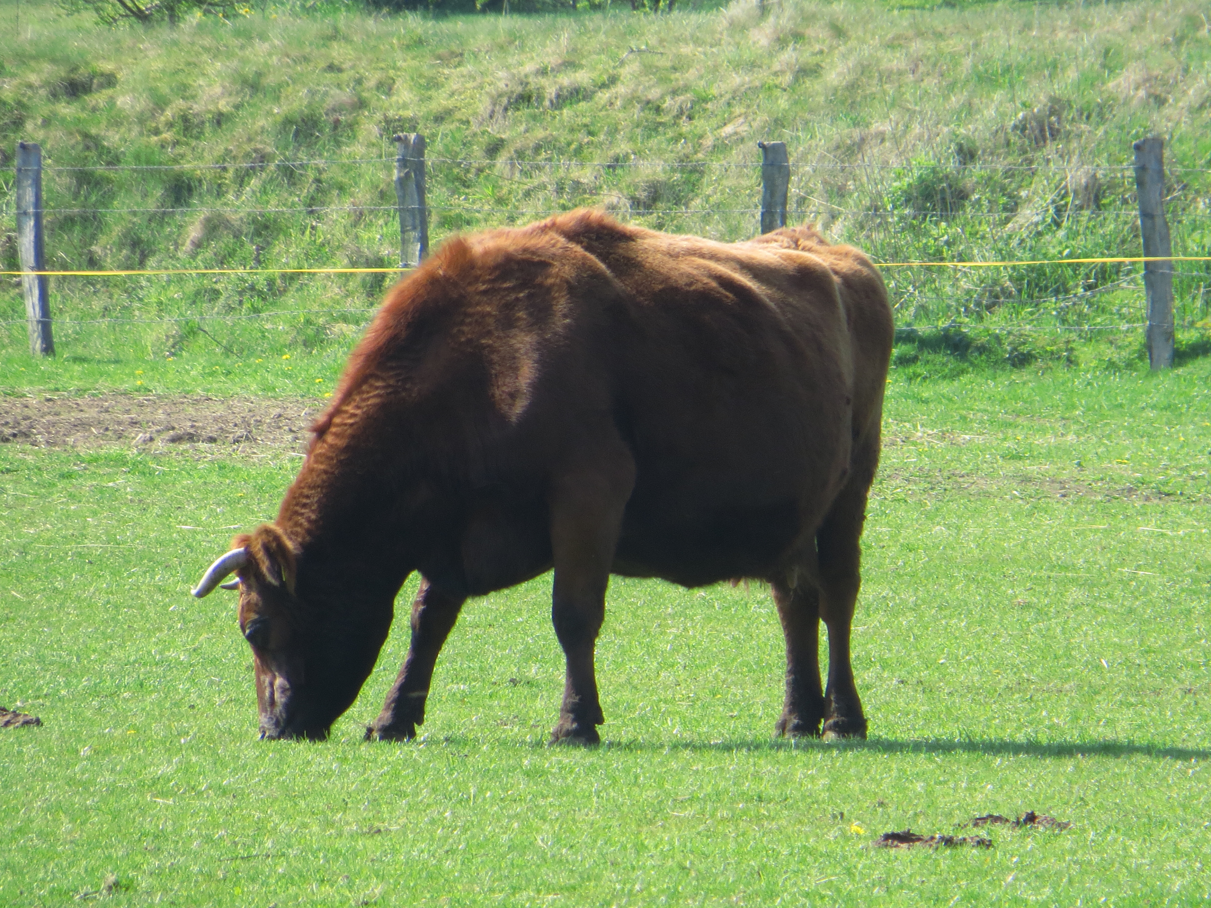 Rotes Angler Rind alten Typs